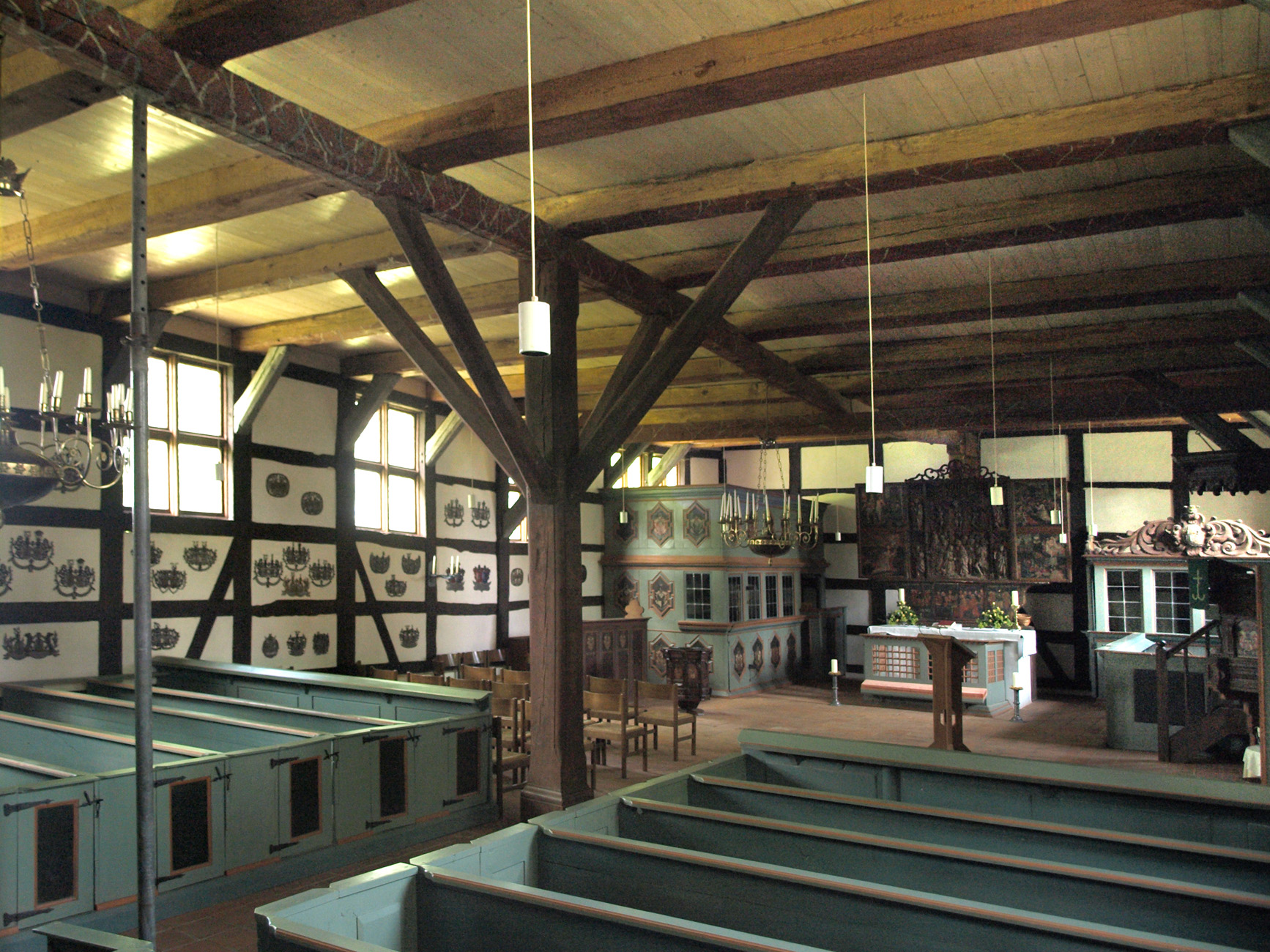 Stuer (Mecklenburg-Vorpommern), Dorfkirche, Innen, Foto: 2012